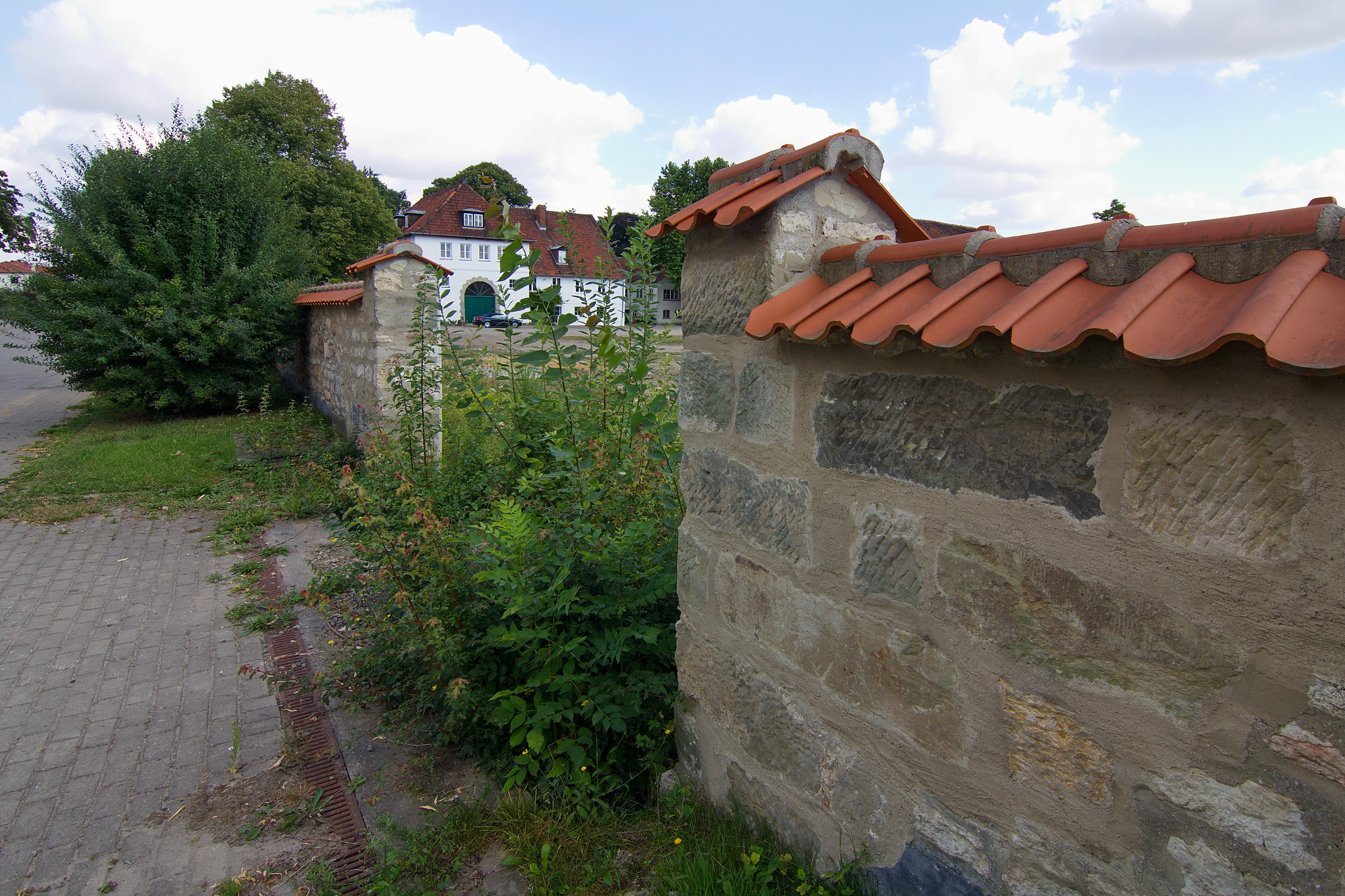 Das im Jahr 1660 gebaute Rittergut wurde 1736 fürstliches Kammergut. Nach wechselndem Besitz und Zerstörungen im 2. Weltkrieg gehört das Gut heute der Stadt Wolfenbüttel.